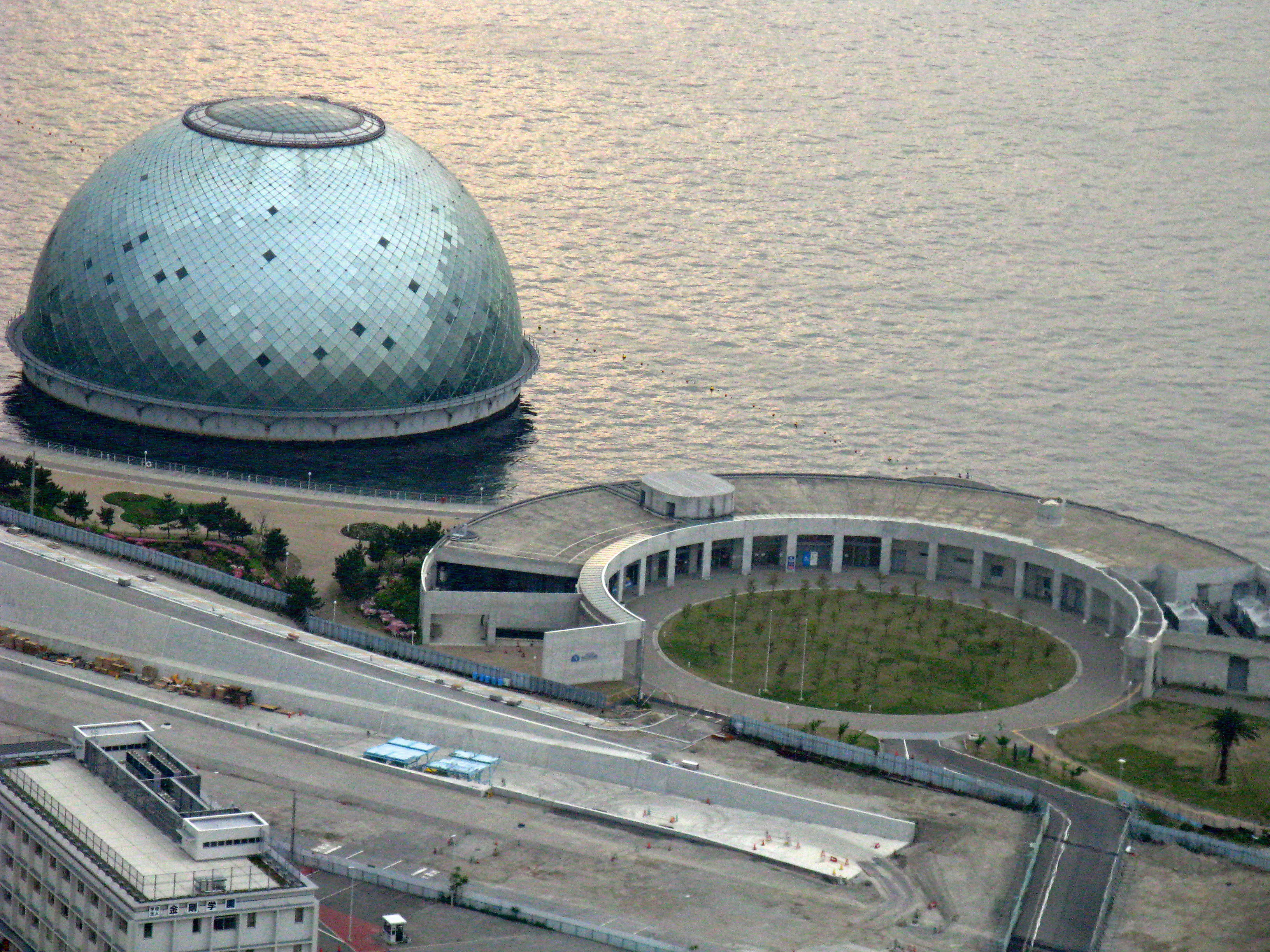 なにわの海の時空館